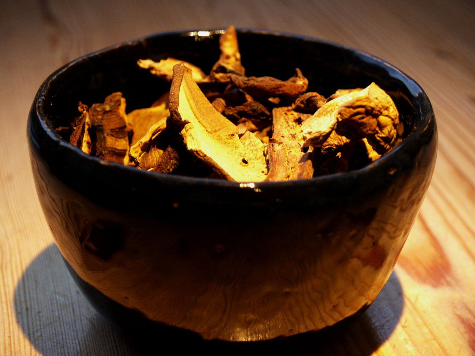 Tørret Karl Johan